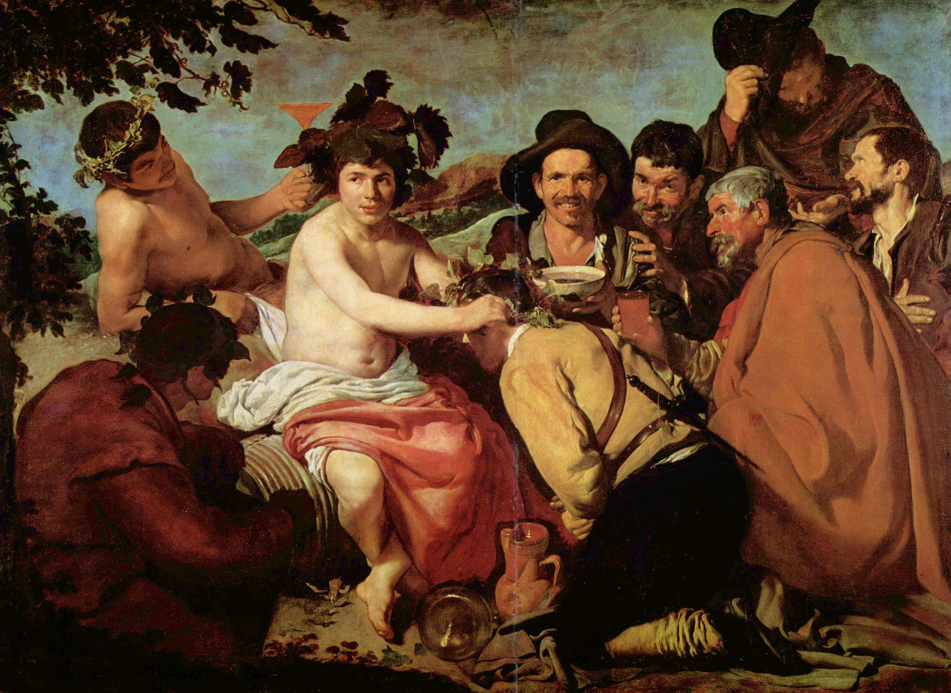 La obra, titulada El triunfo de Baco o Los Borrachos, es una de las obras mitológicas más conocidas del pintor sevillano Diego Velázquez.